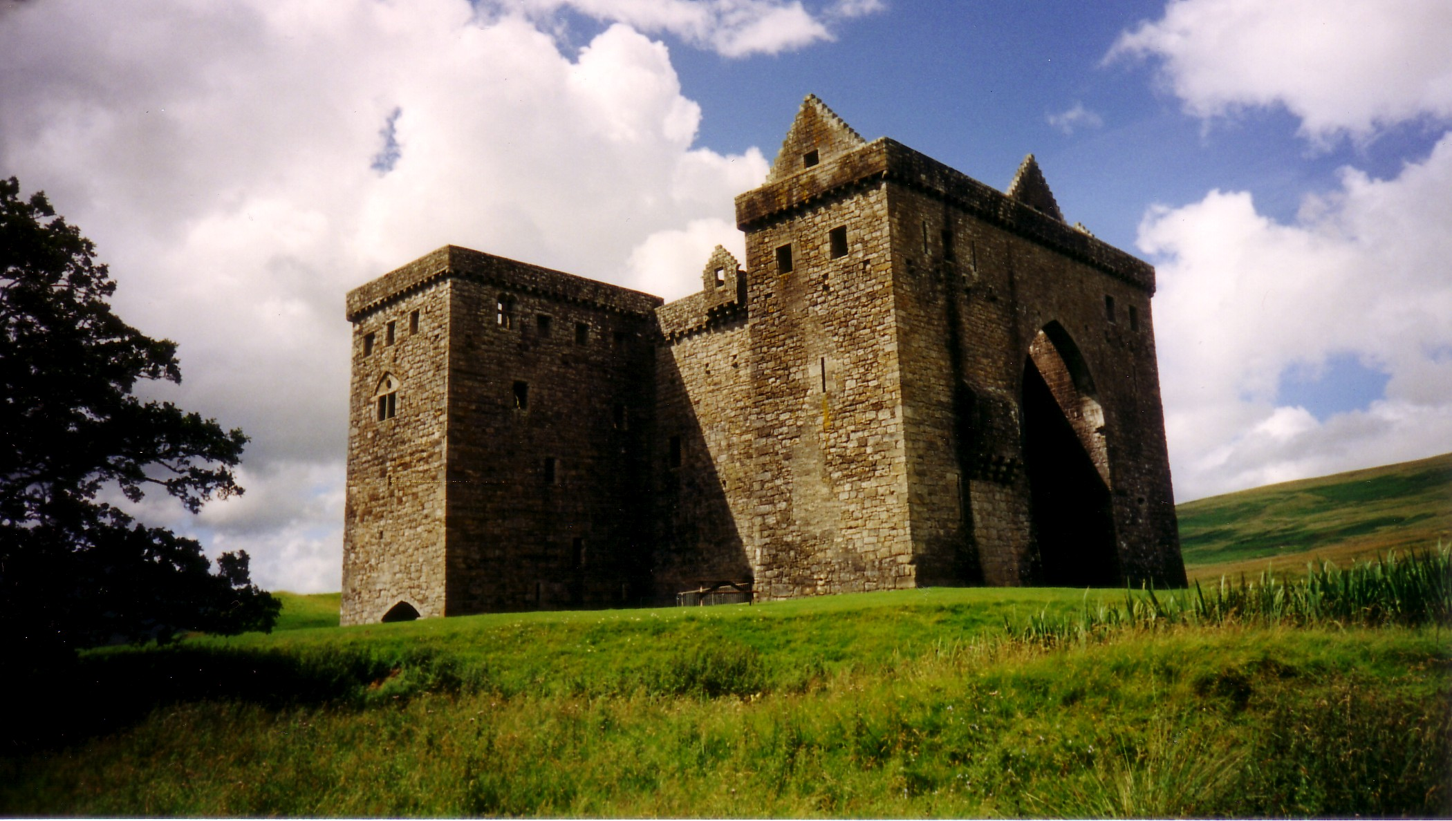 Hermitage Castle bei Carlisle, Südschottland